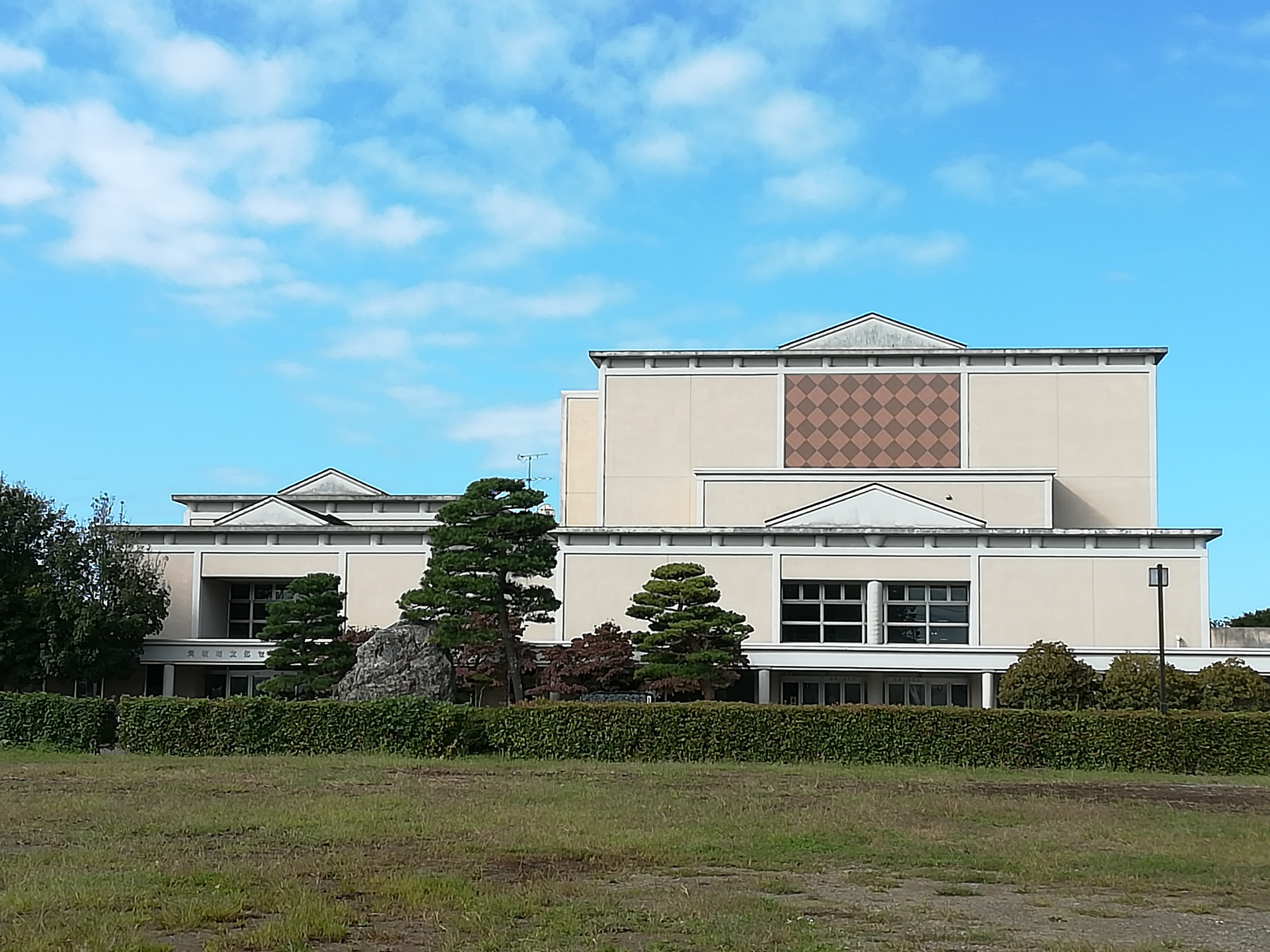 矢吹町文化センター、2018年9月23日、福島県西白河郡矢吹町にて撮影。